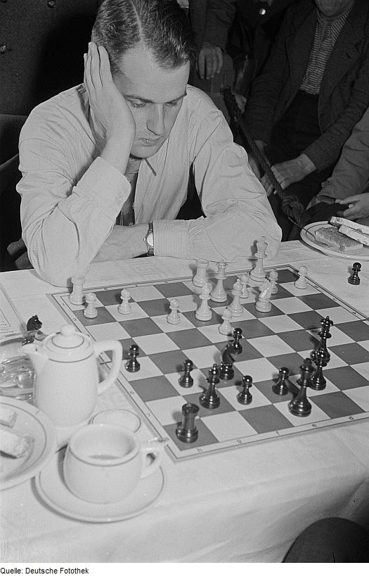 Original image description from the Deutsche Fotothek Wolfgang Unzicker konzentriert auf das Spielbrett schauend bei den Deutschen Schachmeisterschaften